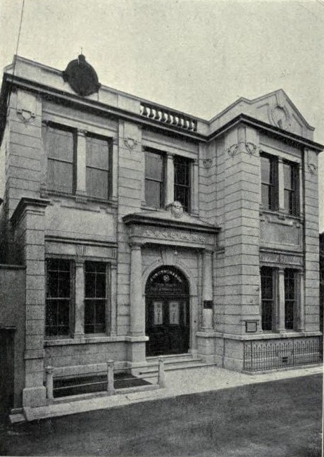 福島浪蔵商店。のちの新光証券